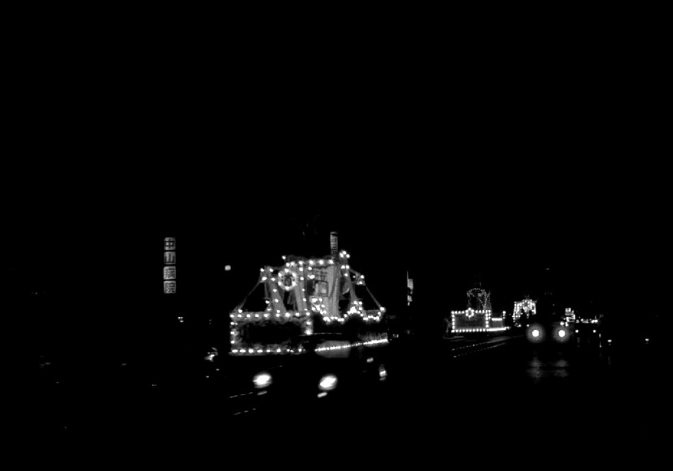 神戸市港祭り花電車 中山病院前